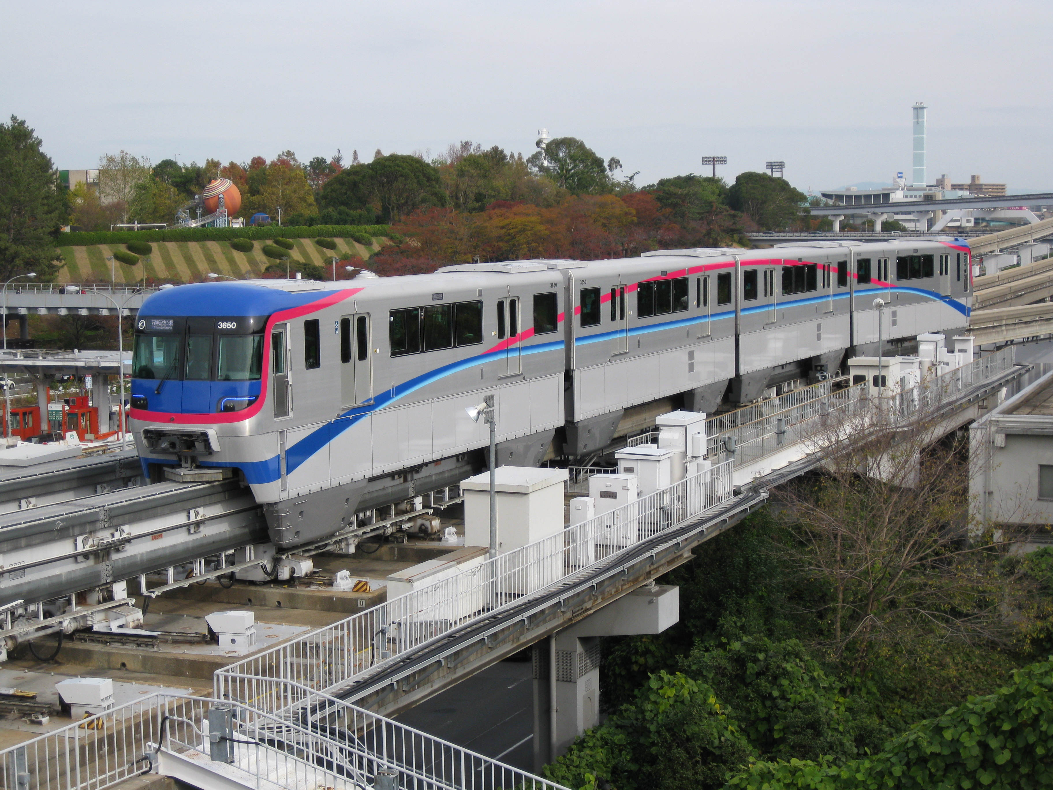 万博記念公園駅に到着する3000系